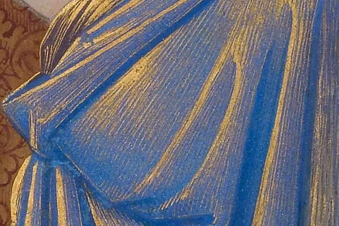 Heures Louis XII Présentation au Temple (détail) - Plis bleus dans le vêtement de Marie